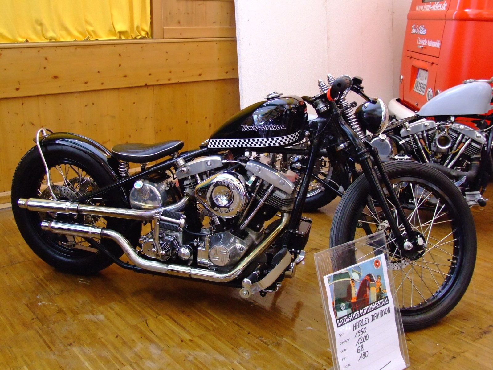 Harley-Davidson Baujahr: 1950 1200 ccm 68 PS 180 km/h Quelle: selbst fotografiert, 07/2007 Fotograf: Späth Chr.